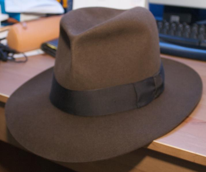 Borsalino identique à celui d'Indiana Jones